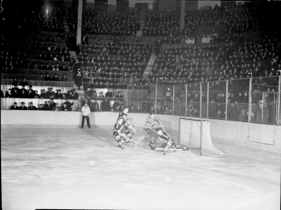 Match de hockey opposant les «Black Hawks» de Chicago et les Canadiens de Montréal au Forum de Montréal.